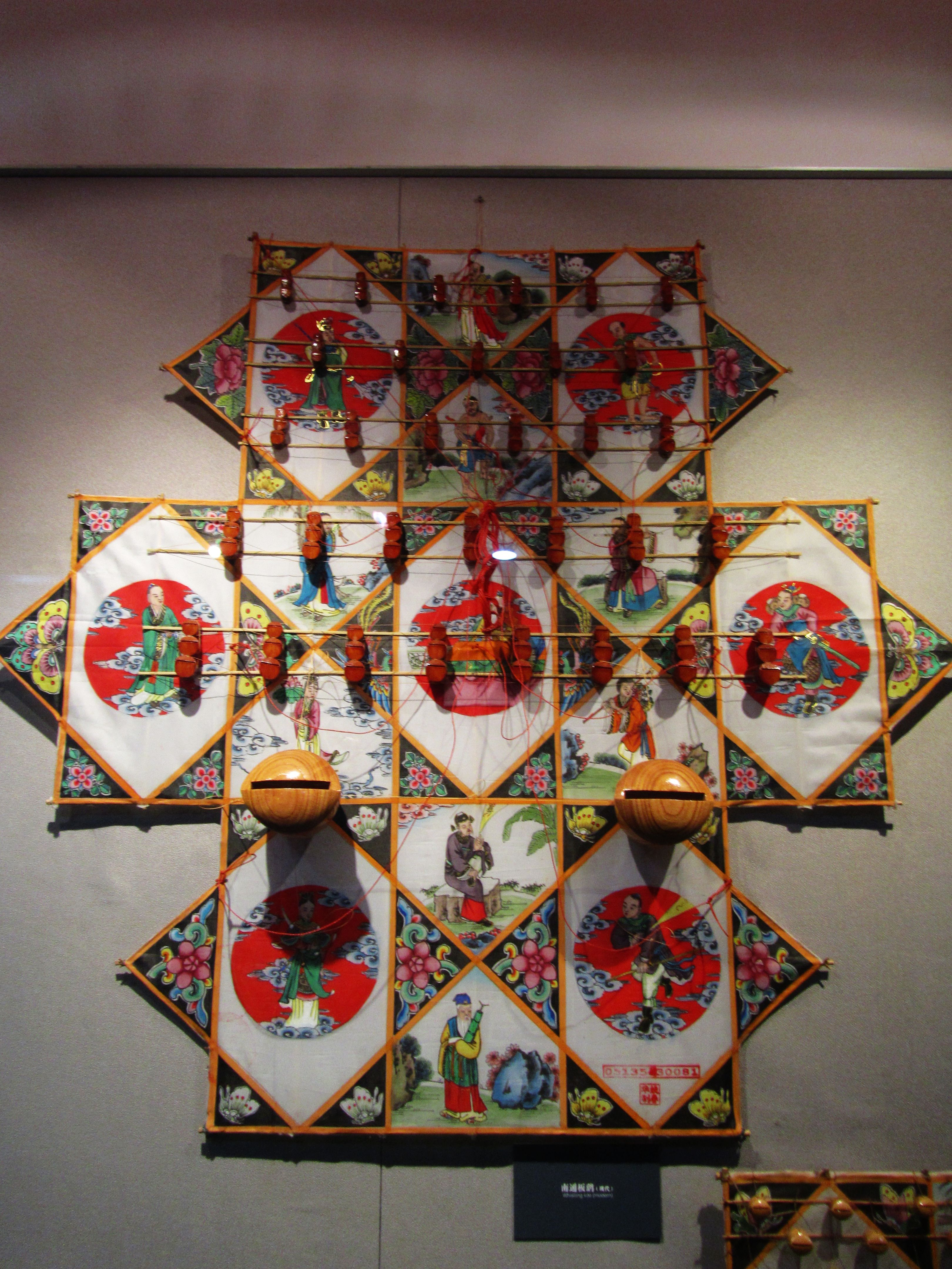 南通博物苑藏南通板鹞。